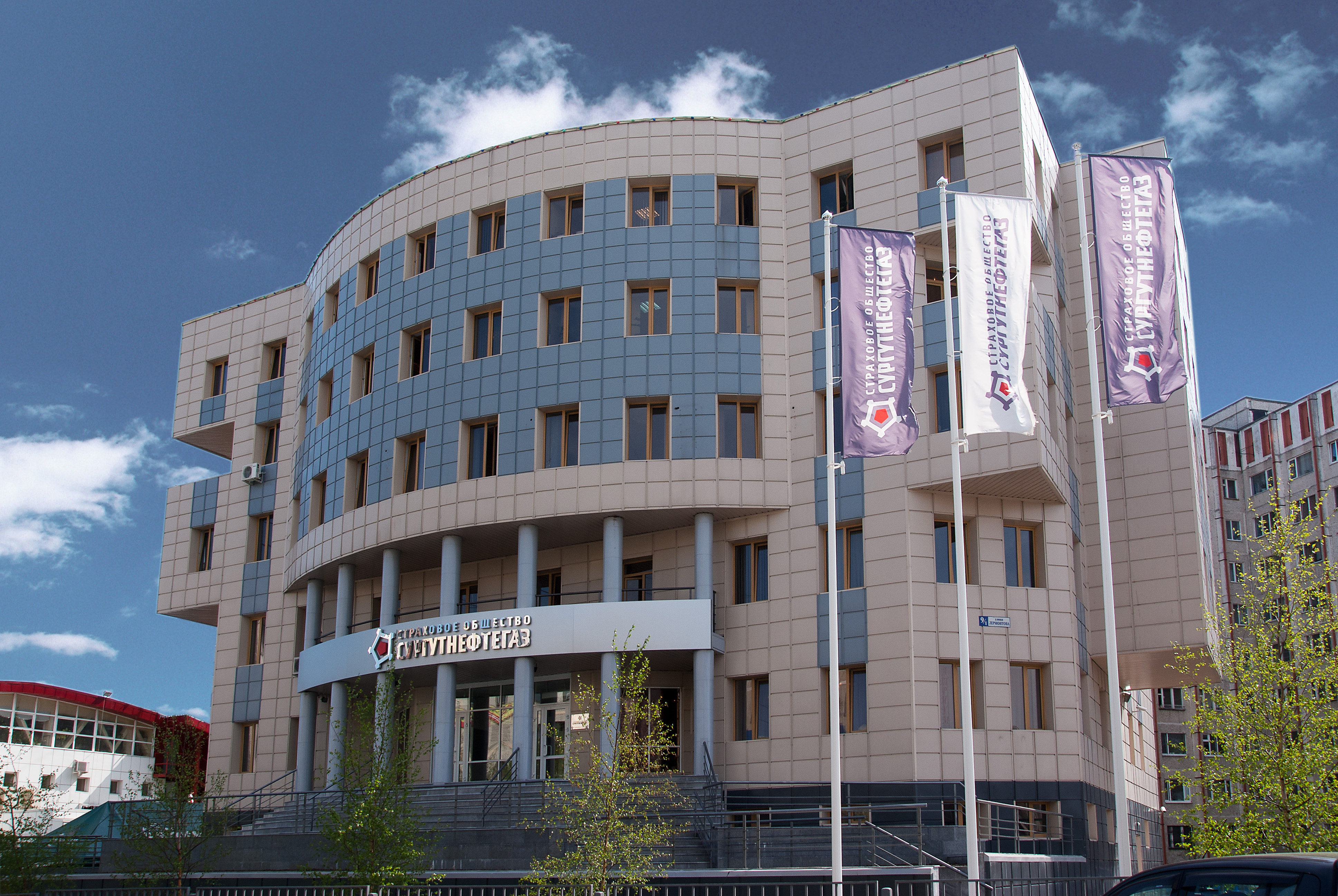 Головной офис компании ООО «Страховое общество «Сургутнефтегаз», г. Сургут